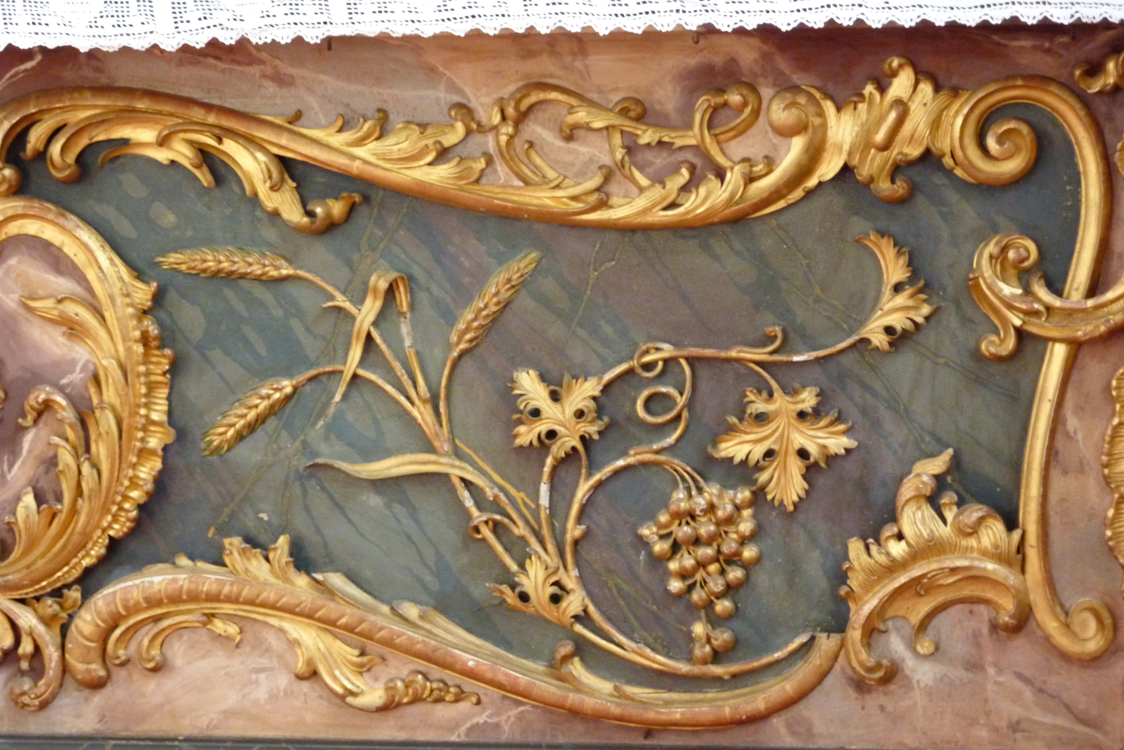 Katholische Pfarrkirche St. Vitus in Donaualtheim (Dillingen an der Donau), Antependium des Hochaltares mit den eucharistischen Symbolen Brot (Getreide) und Wein